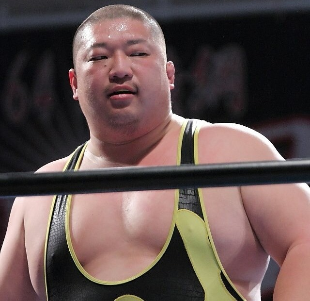 柴田正人の試合中画像